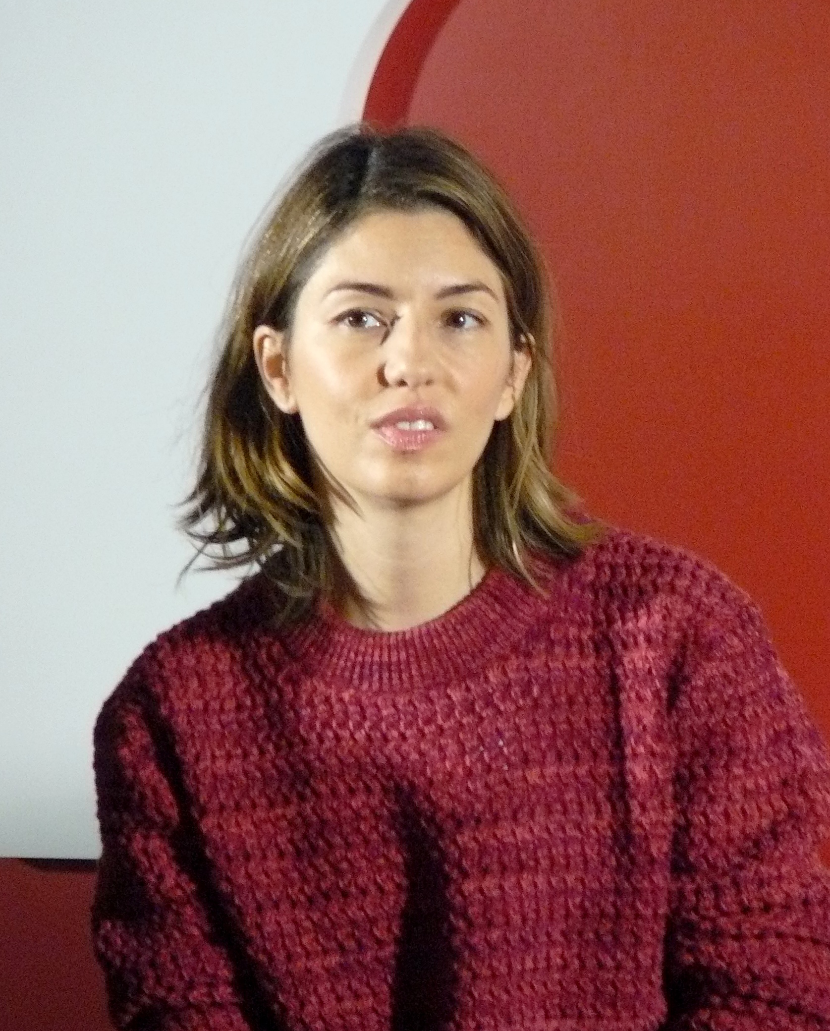 Sofia Coppola, le 7 novembre 2010 à la FNAC Montparnasse, lors d'une rencontre Masterclass à l'occasion de la sortie en janvier 2011 de son prochain film Somewhere.